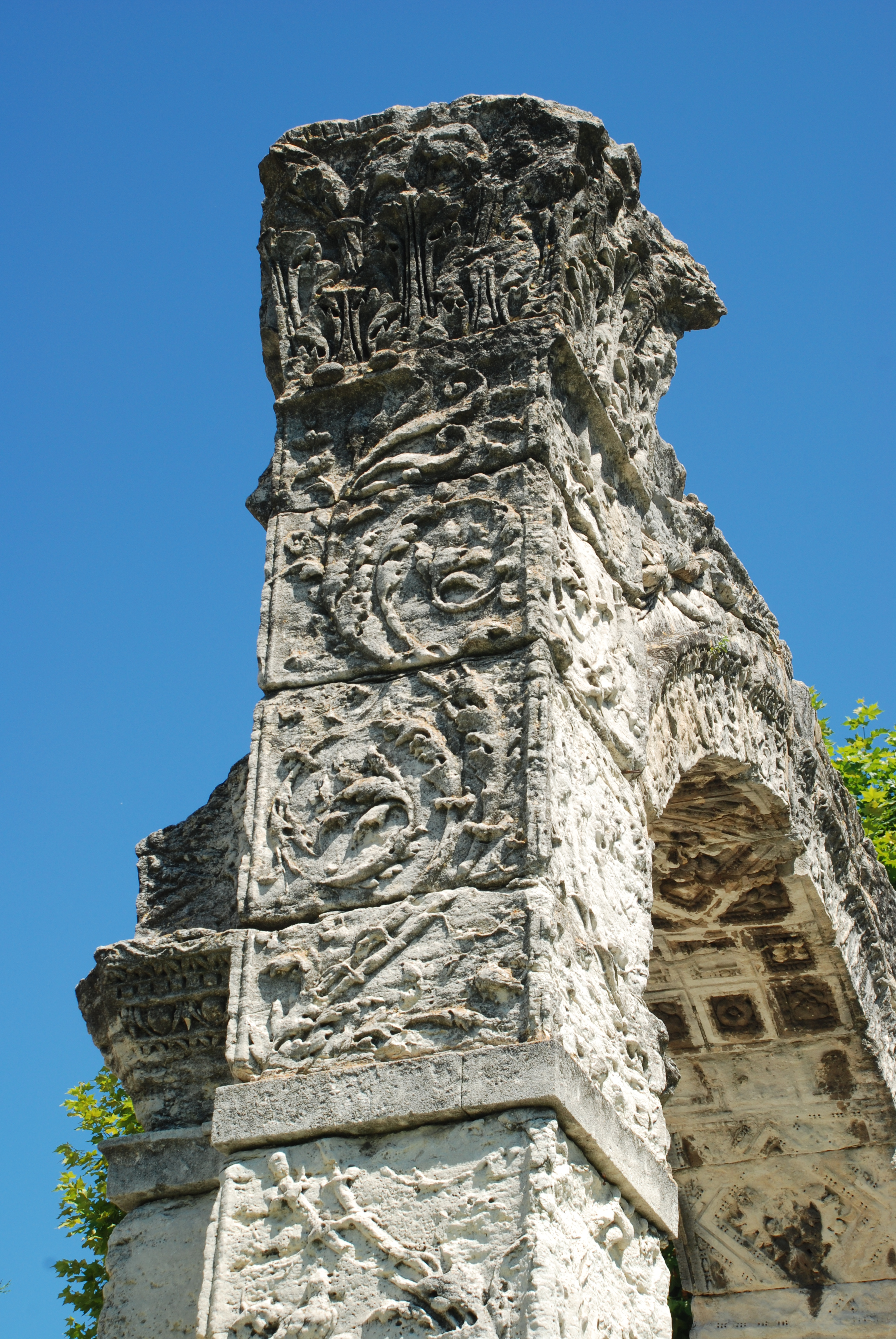 France - Provence - Vaucluse - Arc antique de Cavaillon